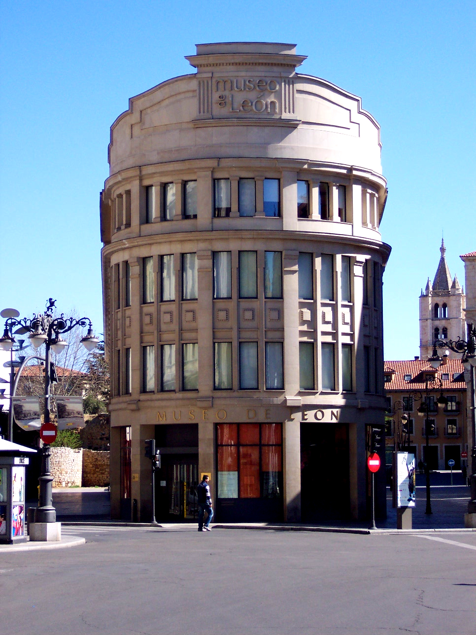 Vista frontal del Museo de León, en el edificio Pallarés.